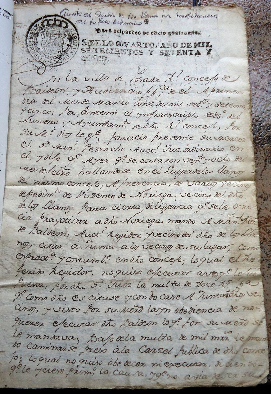 Consejo de Baldeon